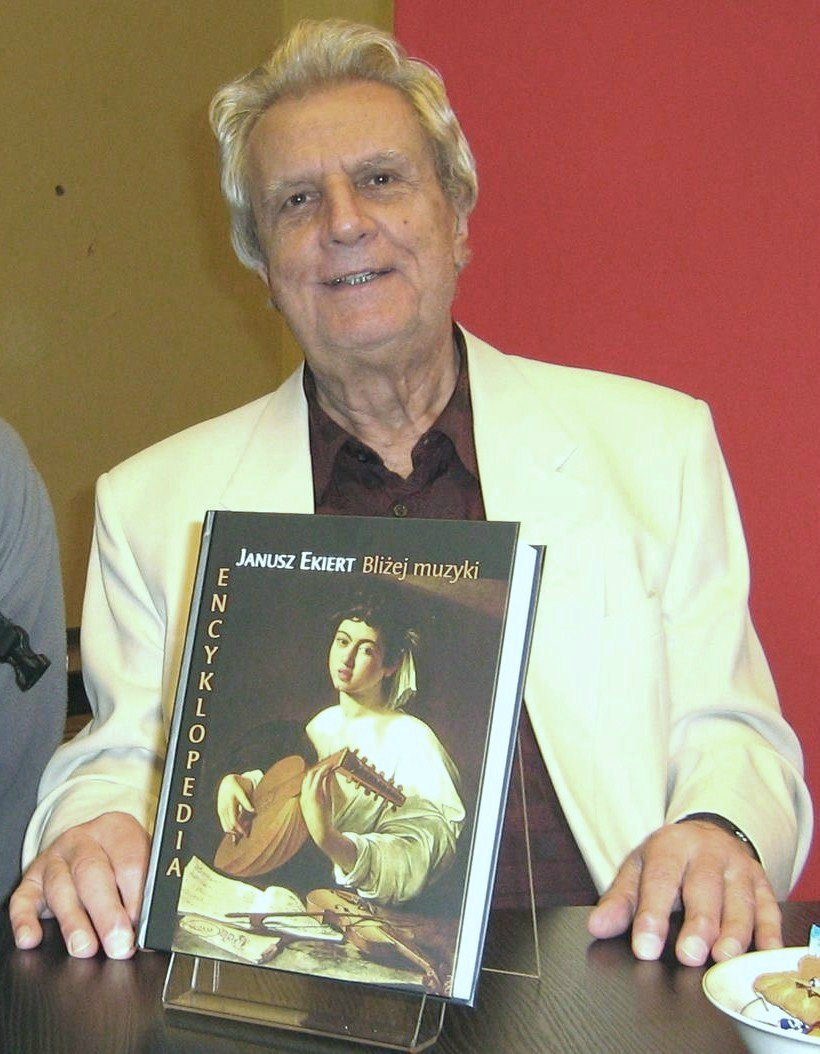 Janusz Ekiert (1931-2016), muzykolog, krytyk muzyczny, publicysta.